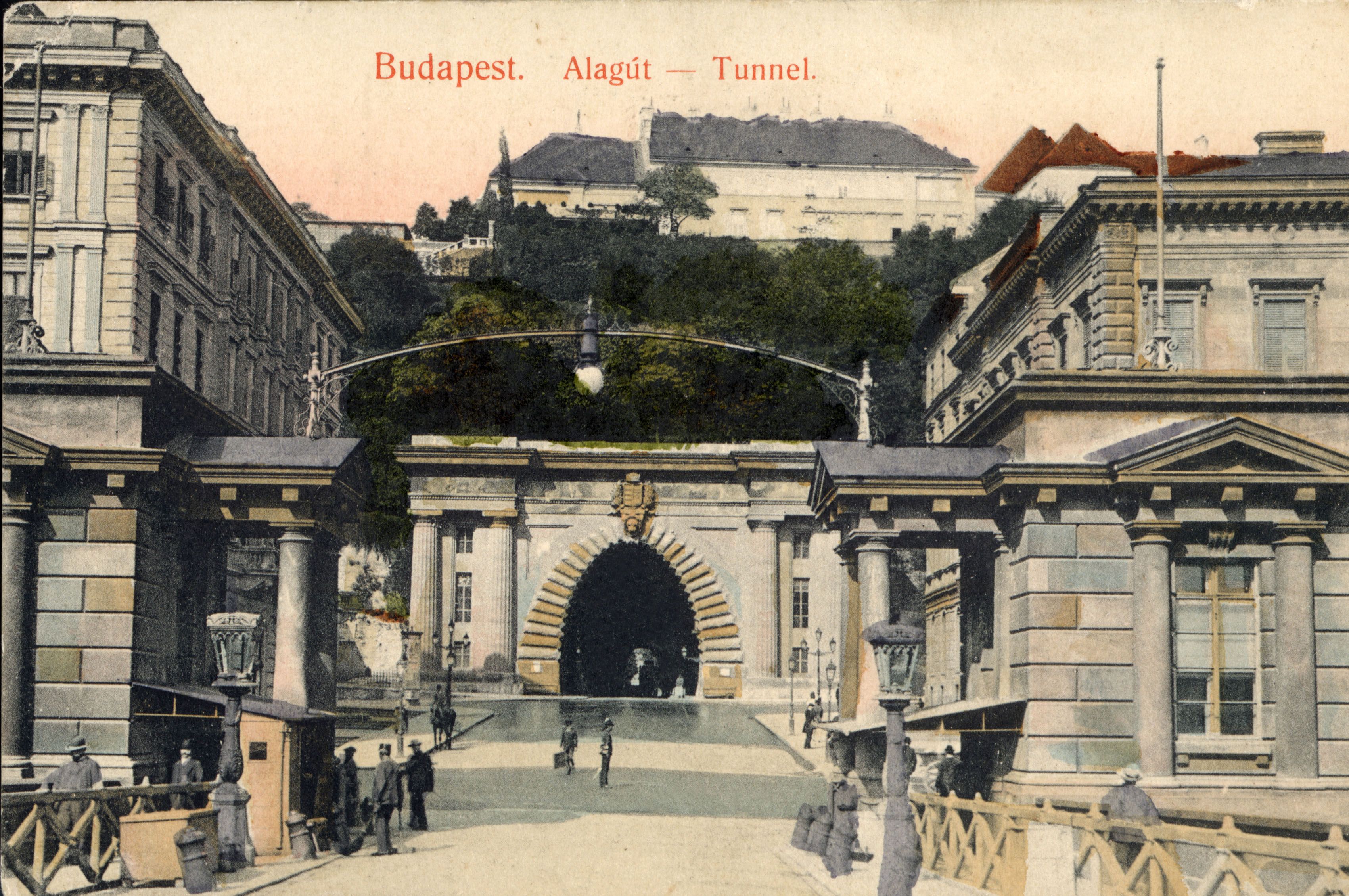 Budapest; Tunnel